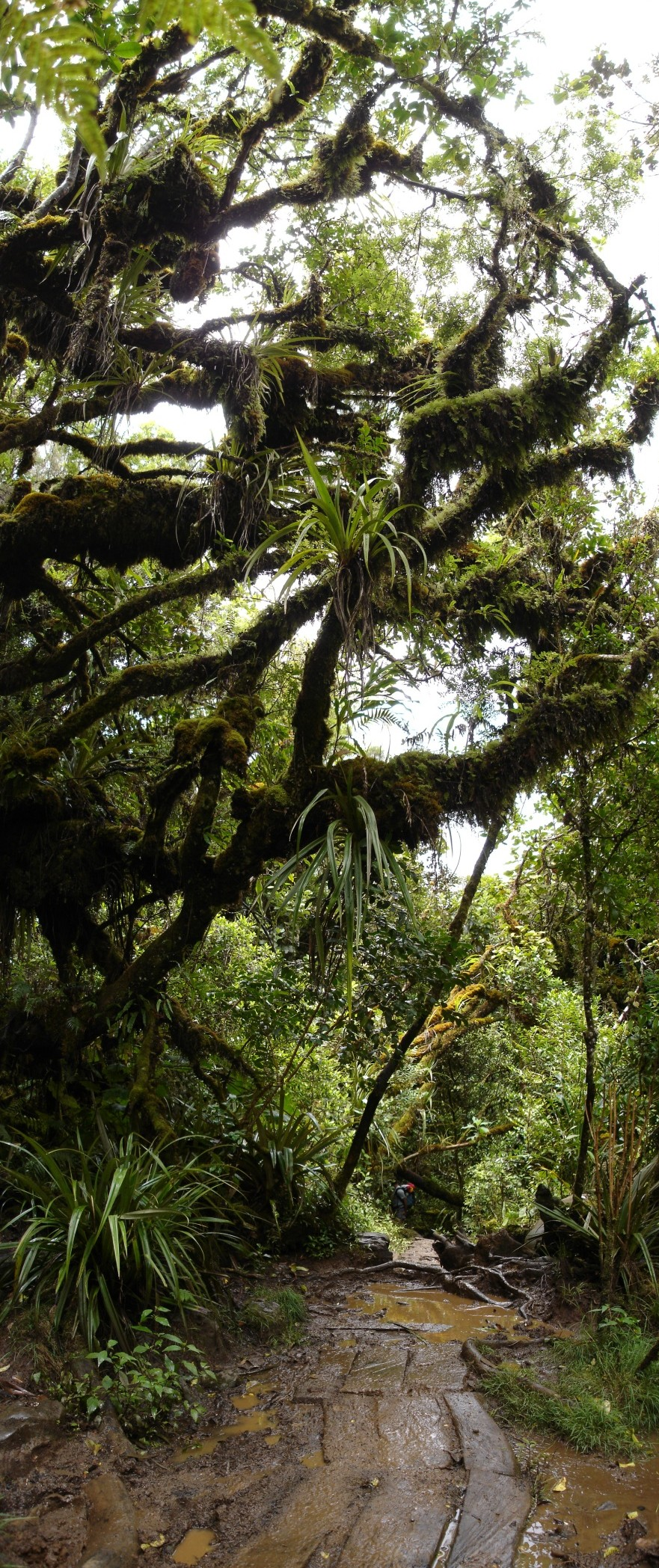 Description: Sentier dans la forêt de Bélouve, direction du Trou de Fer, novembre 2004, La Réunion Source: Bouba